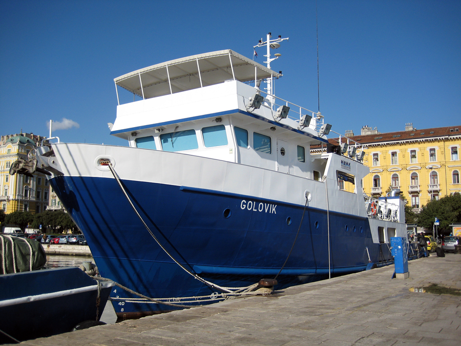 Riječka luka